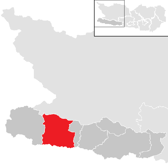 Bezirk Hermagor